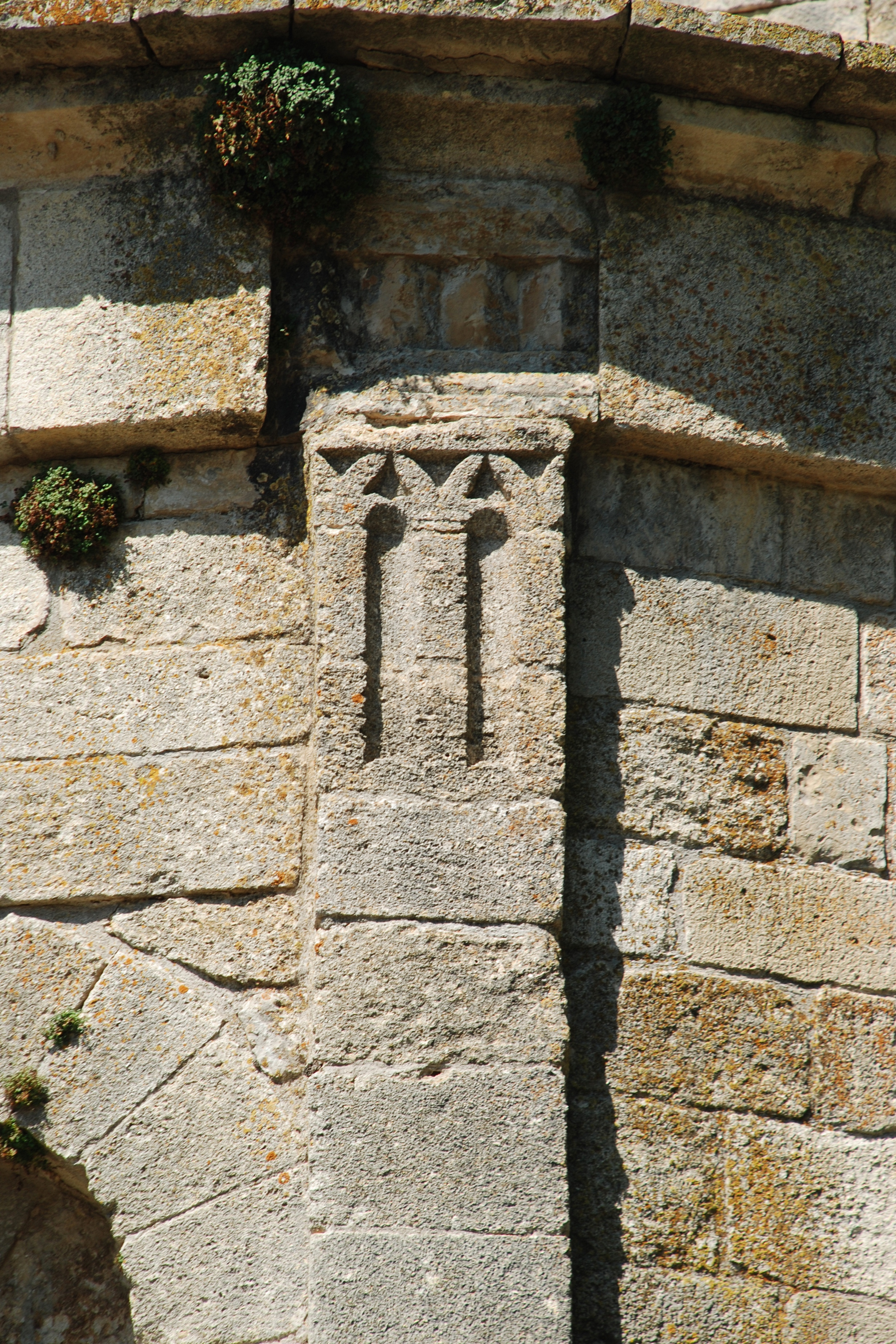 France - Provence - Église de Saint-Trinit